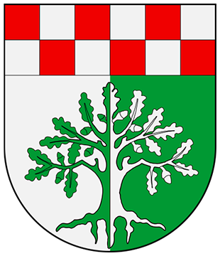 Das Schildhaupt erinnert an die ehemalige Zugehörigkeit zur Hinteren Grafschaft Spornheim, Oberamt Birkenfeld. Die Schildspaltung weist auf die beiden Ortsteile hin, während die Eiche die „Dicke Eiche am Dreschplatz“ im Ortsteil Wilzenberg darstellt.